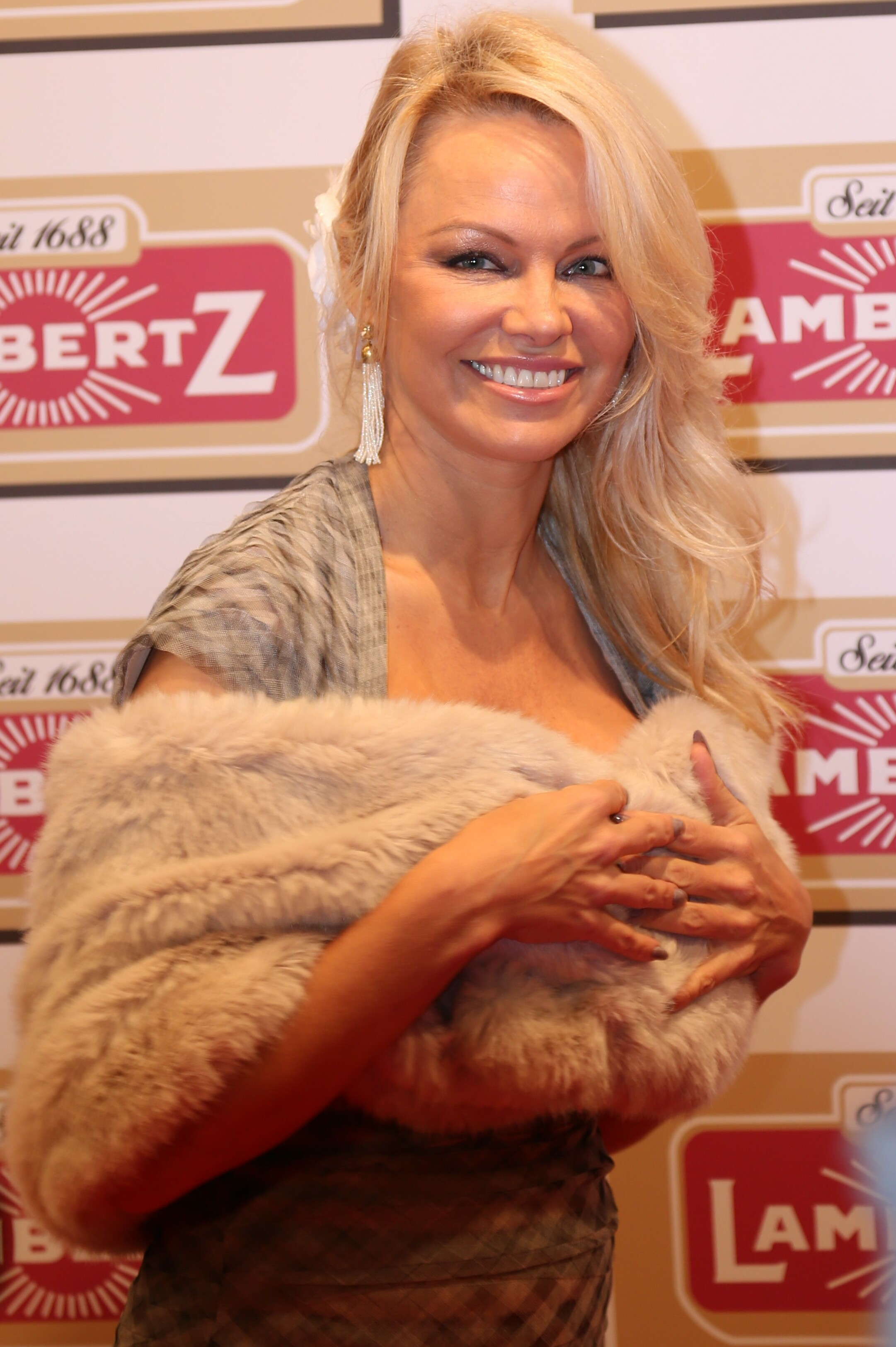 Pamela Anderson bei der Lambertz Monday Night 2017.